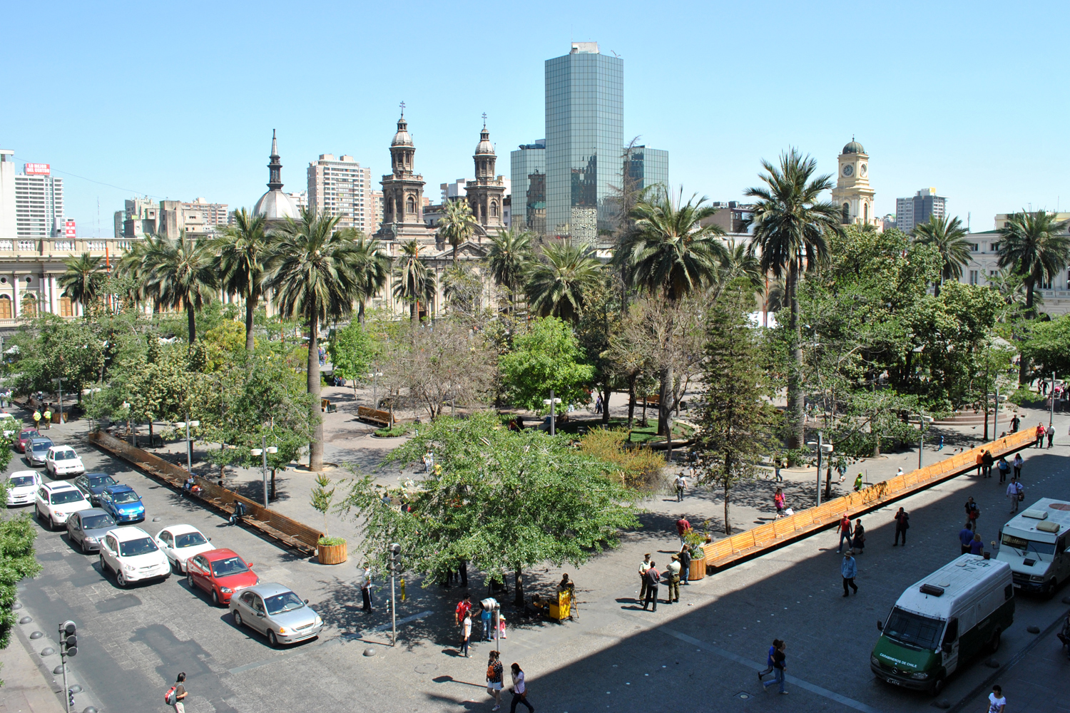 Plaza de Armas. This is a photo of a national monument in Chile: 227